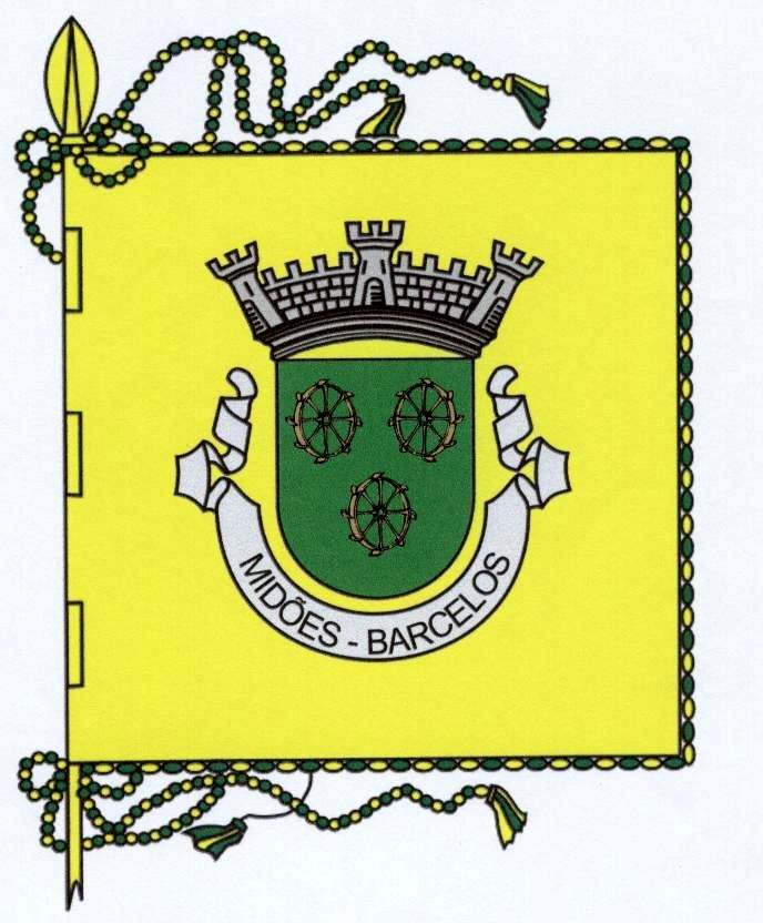 Bandeira de Midoes ( Barcelos)